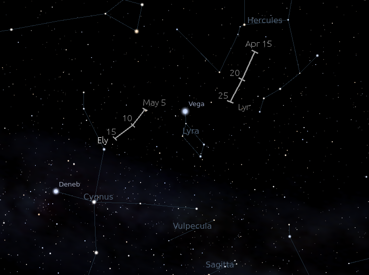 Радіанти метеорних потоків ета-Ліриди та Ліриди